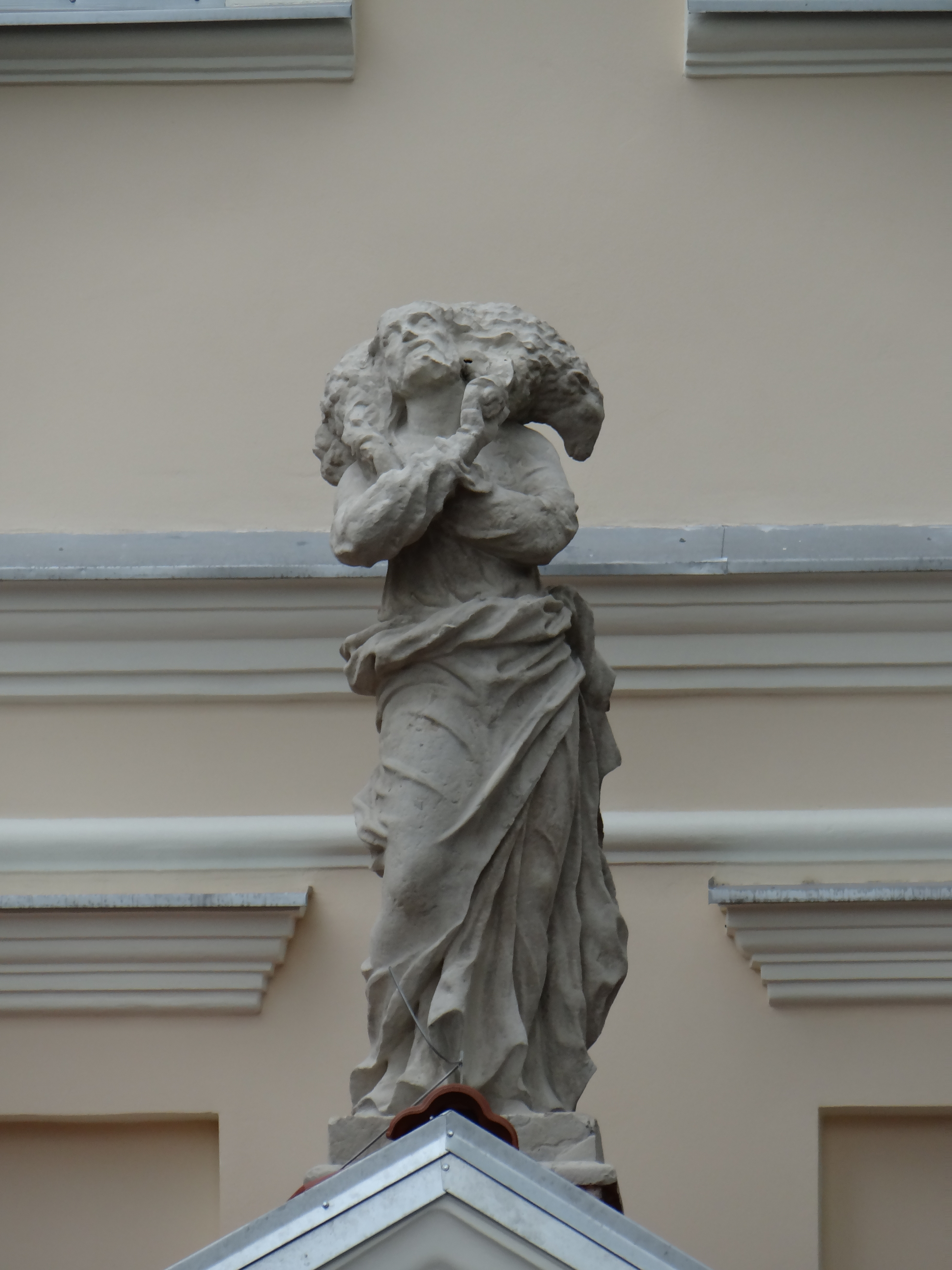 Muzeum w Łowiczu - figura Dobrego Pasterza na zwieńczeniu muzealnego portalu (wrót wejściowych)